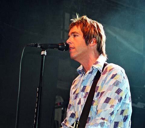 Per Gessle (2003)